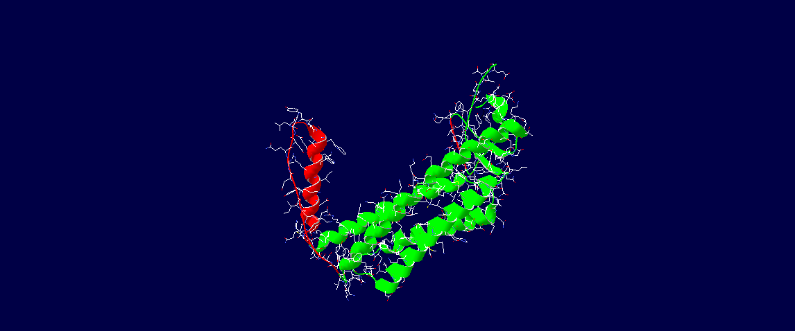 Imágen proteina ADRP usando Swiss-PDB viewer.